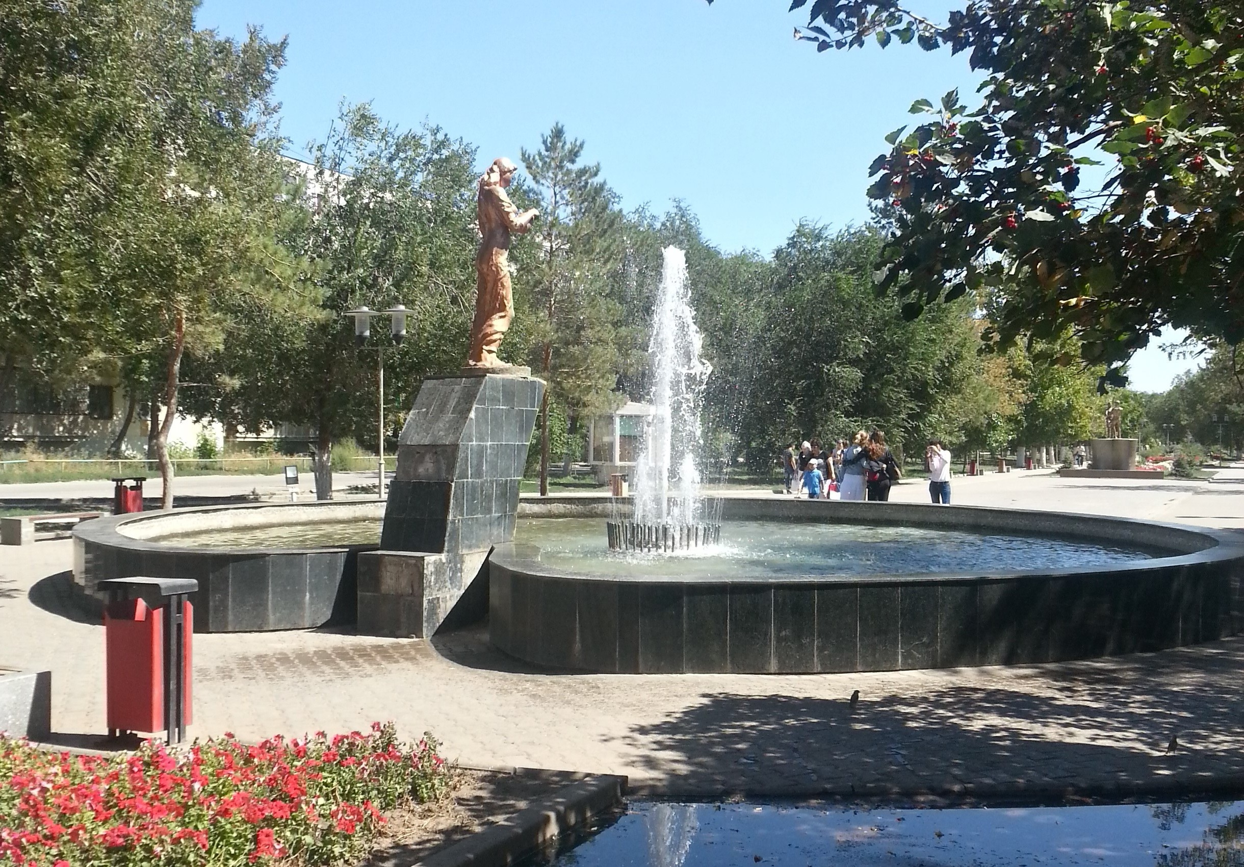 Аллея влюблённых в Актобе.